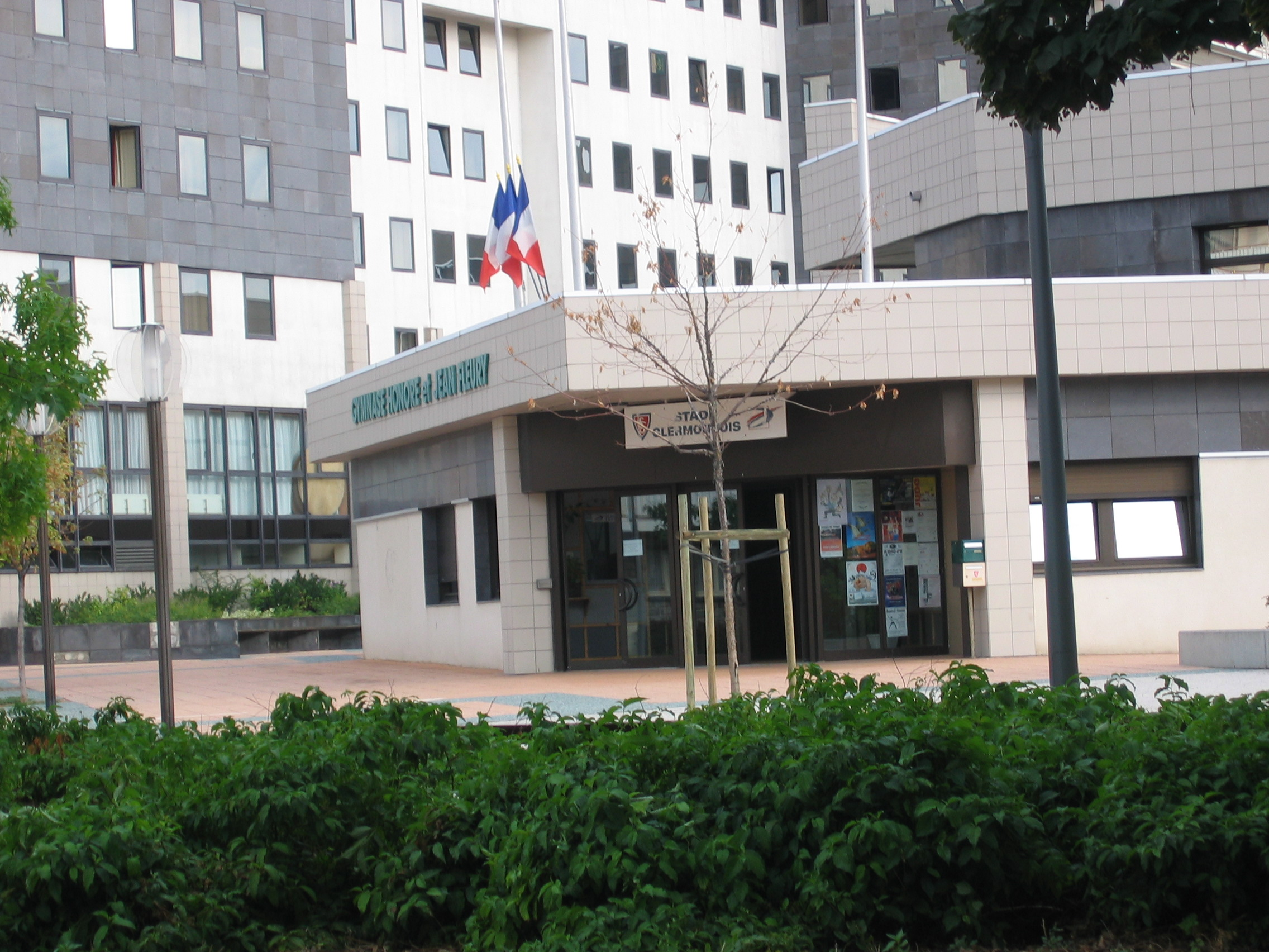 Photographie réalisée par sanguinez. Il sagit du gymnase Honoré et Jean Fleury à Clermont-Ferrand. Personal work from sanguinez. It's the Honoré et Jean Fleury stadium, based in the city of Clermont-Ferrand, France.